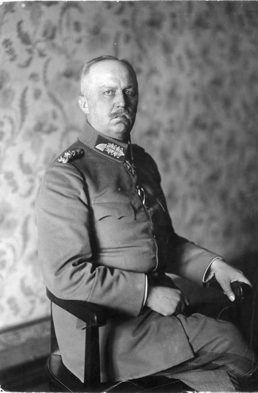 Scherl Bilderdienst: General v. Ludendorff 9911-15